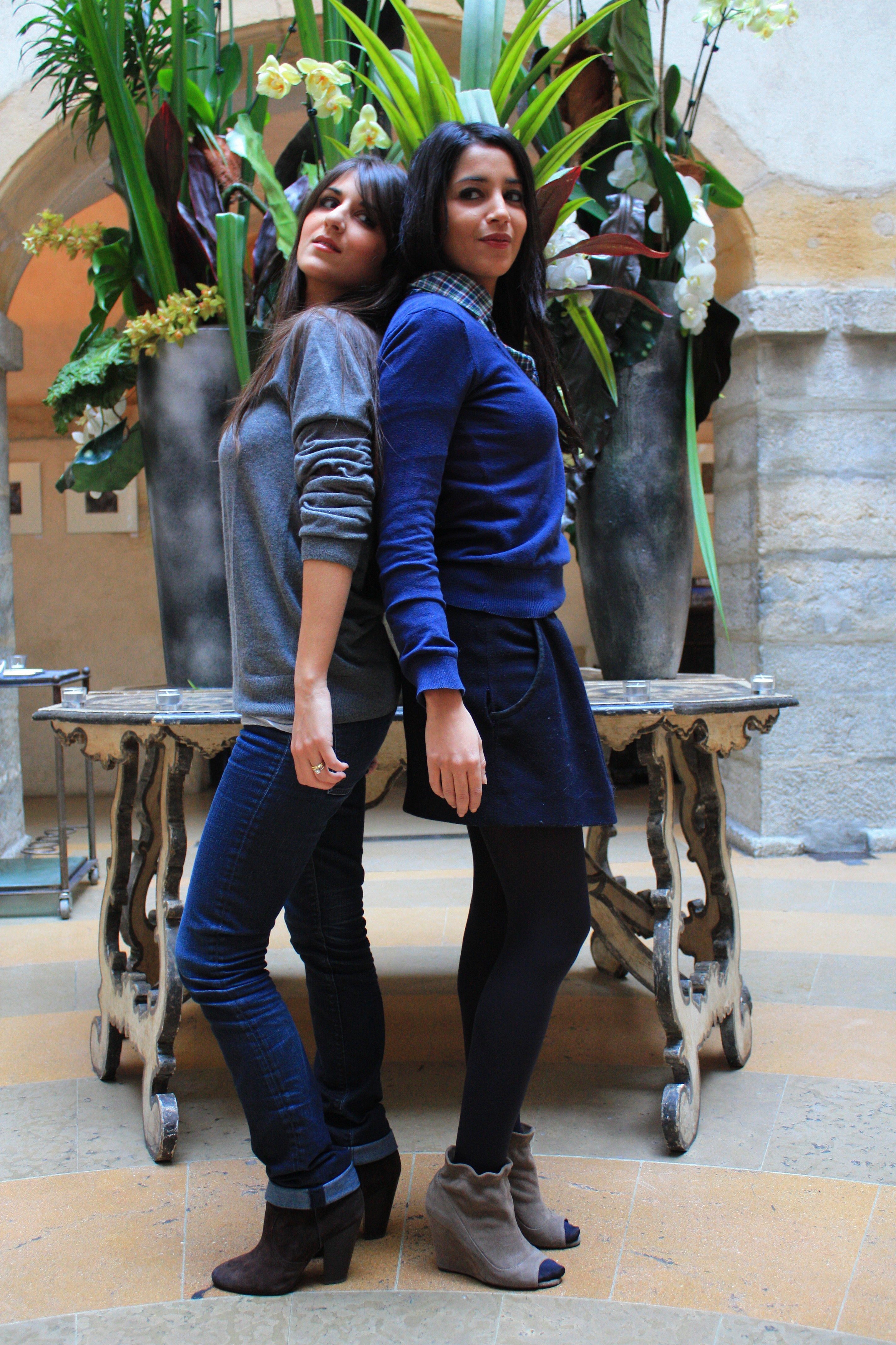 Géraldine Nakache et Leïla Bekhti lors d'une conférence de presse du film Tout ce qui brille (2010), reproduisant leur pose de l'affiche du film.